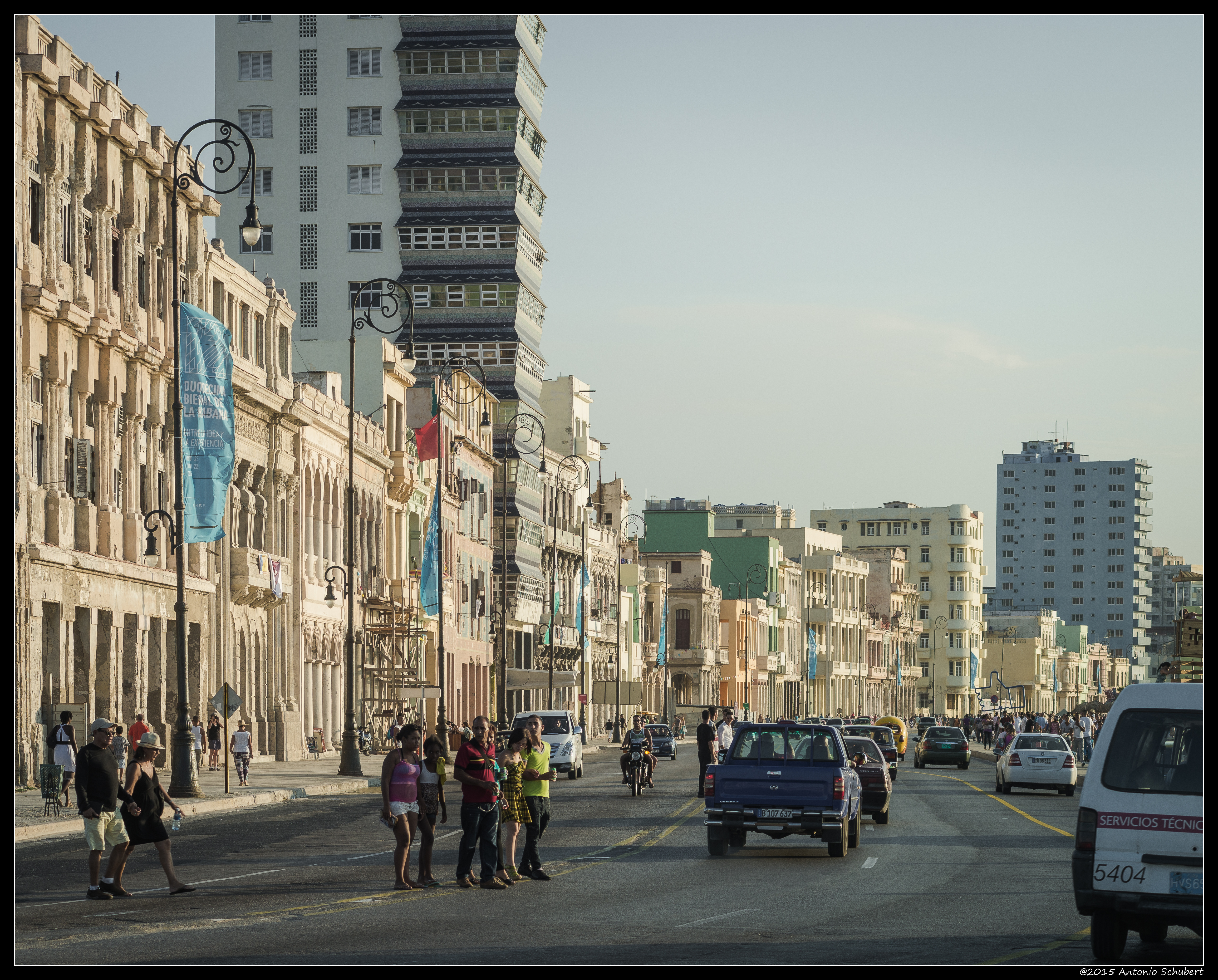 Malecón